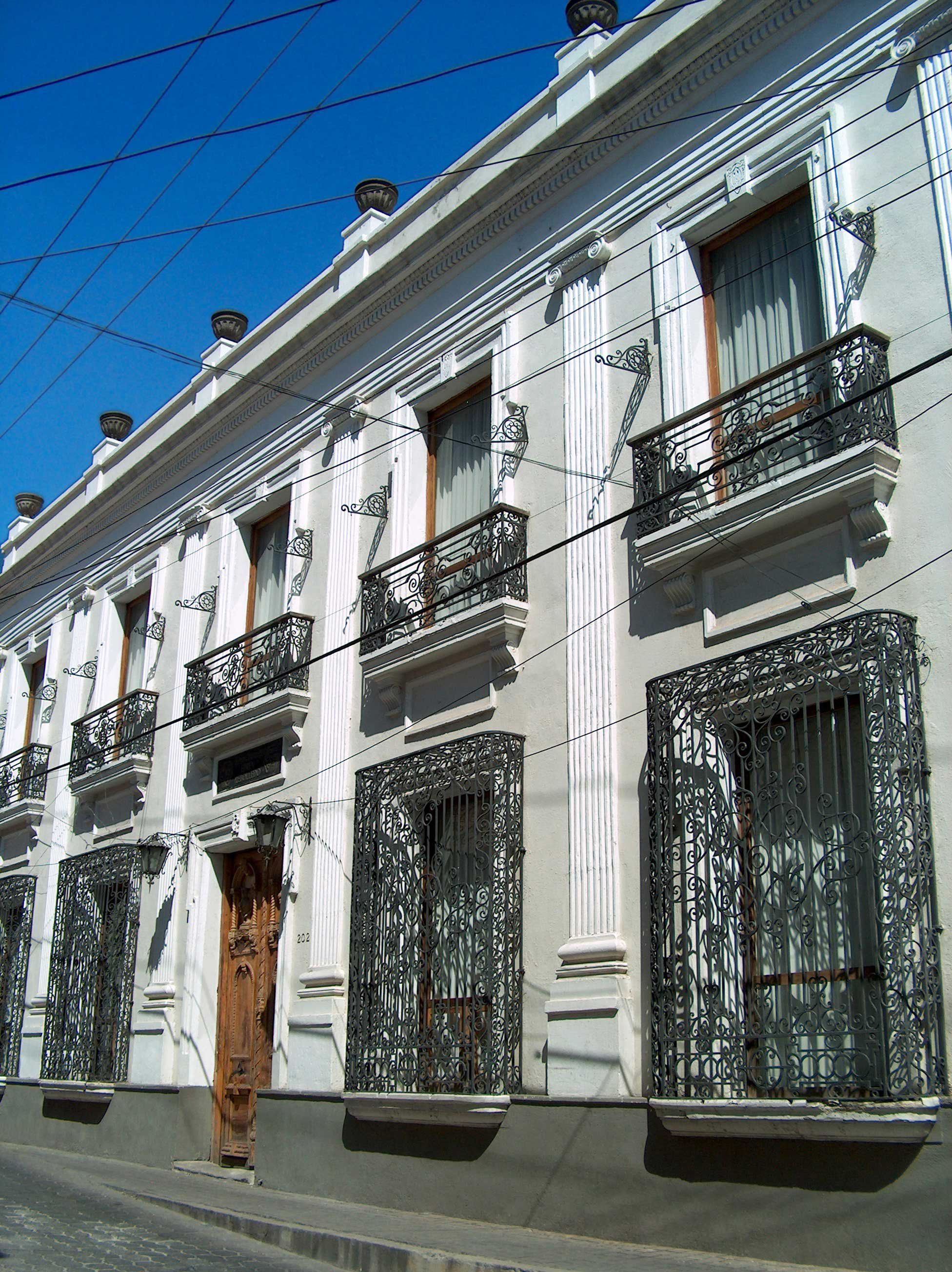 Casa de Pachuca Centro — estado de Hidalgo, México.